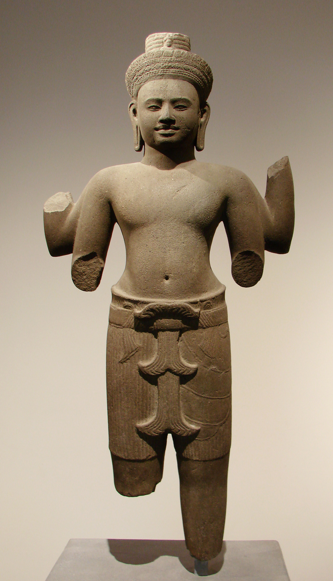 Le Bodhisattva Lokeshvara. Cambodge, fin 10ème - début 11ème siècle. Musée Guimet,Paris.